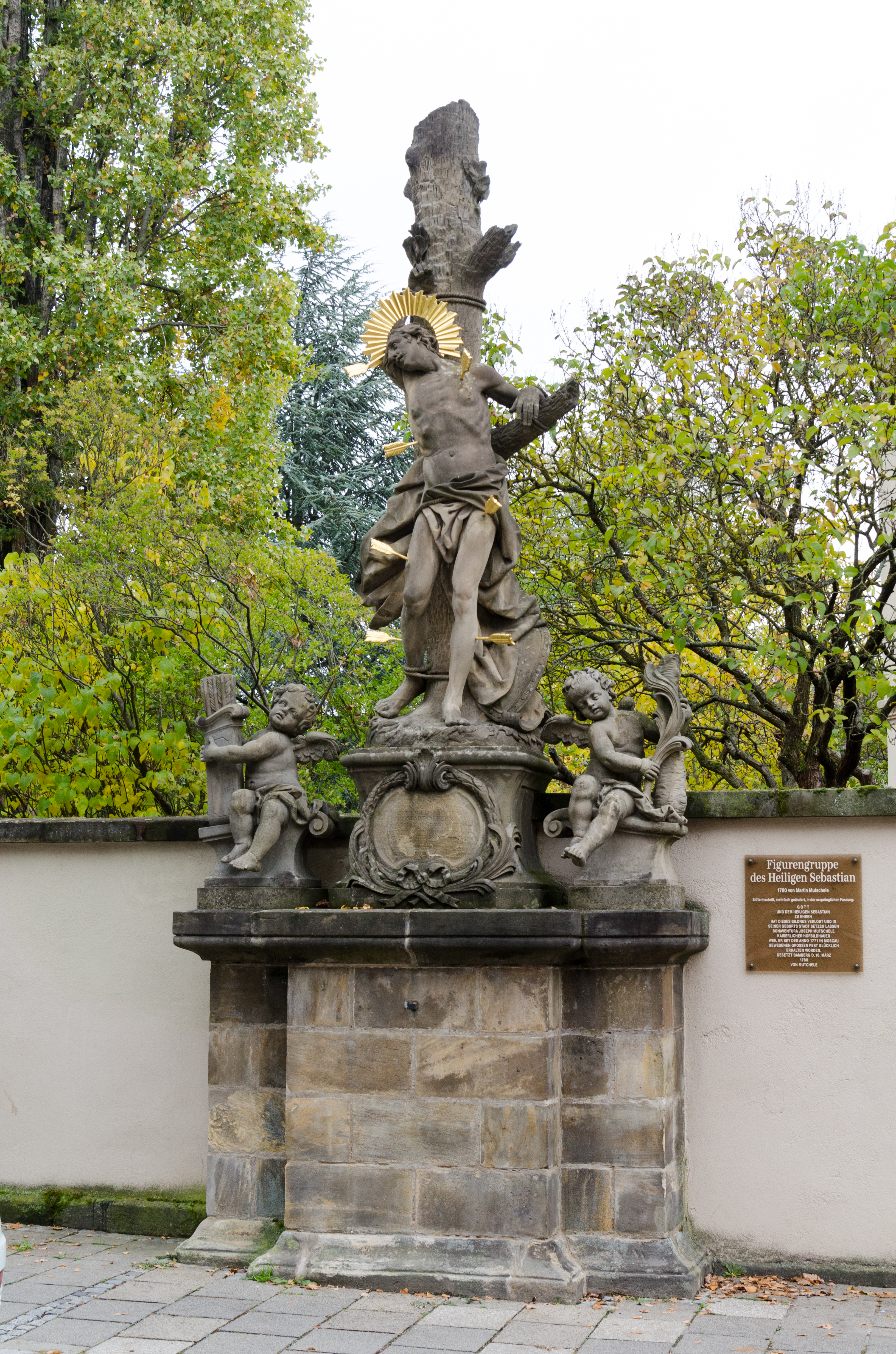 Bamberg, Theuerstadt, Hl. Sebastian